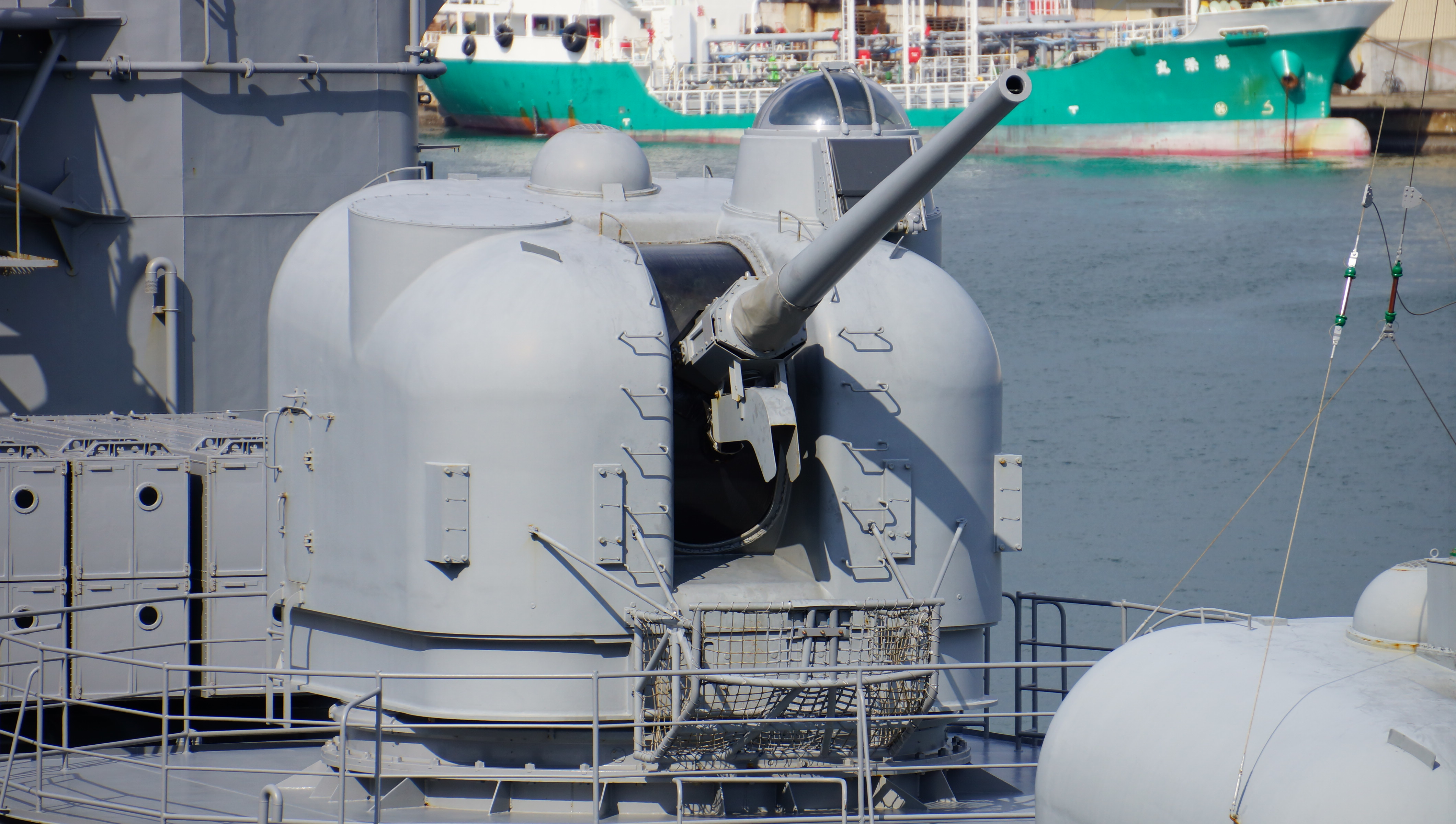 海上自衛隊 護衛艦くらま（DDH-144） 73式54口径5インチ単装速射砲。2013年10月27日 神戸港にて。